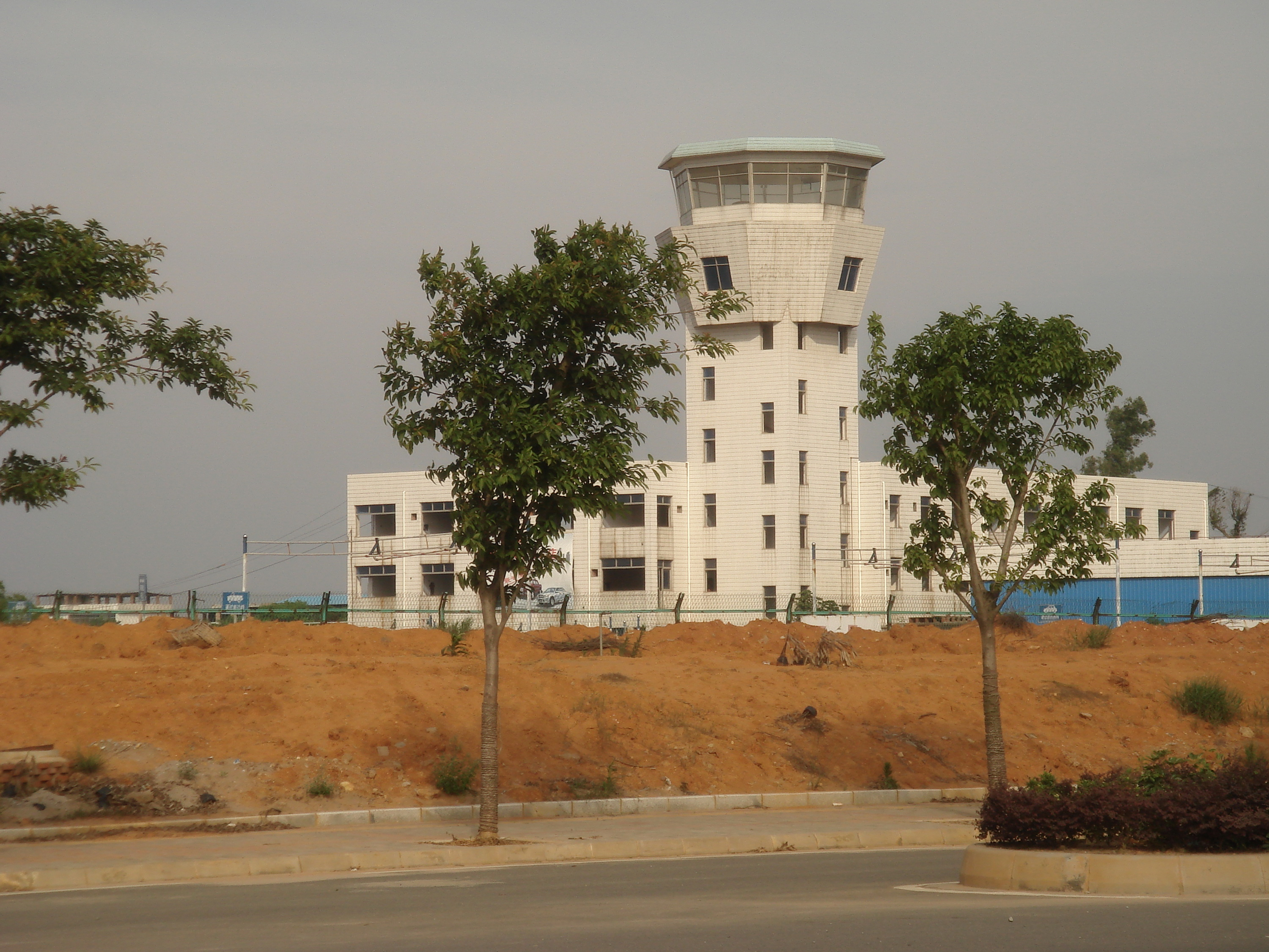 废弃的原黄金机场航站楼